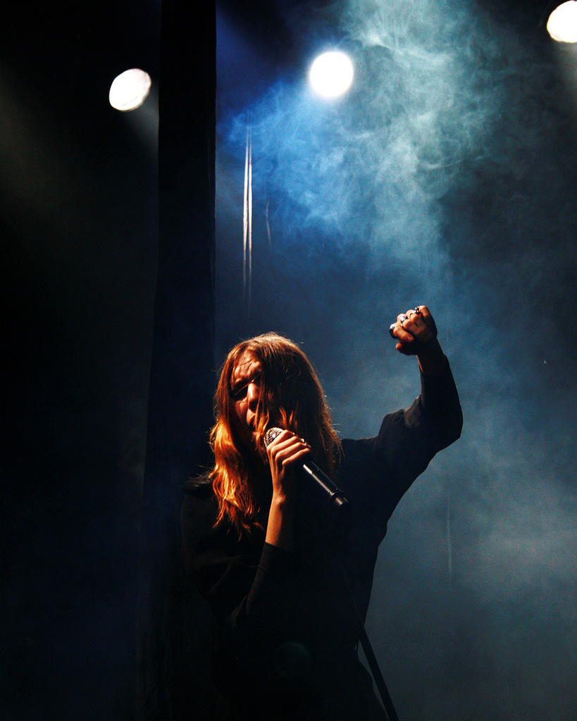 009a